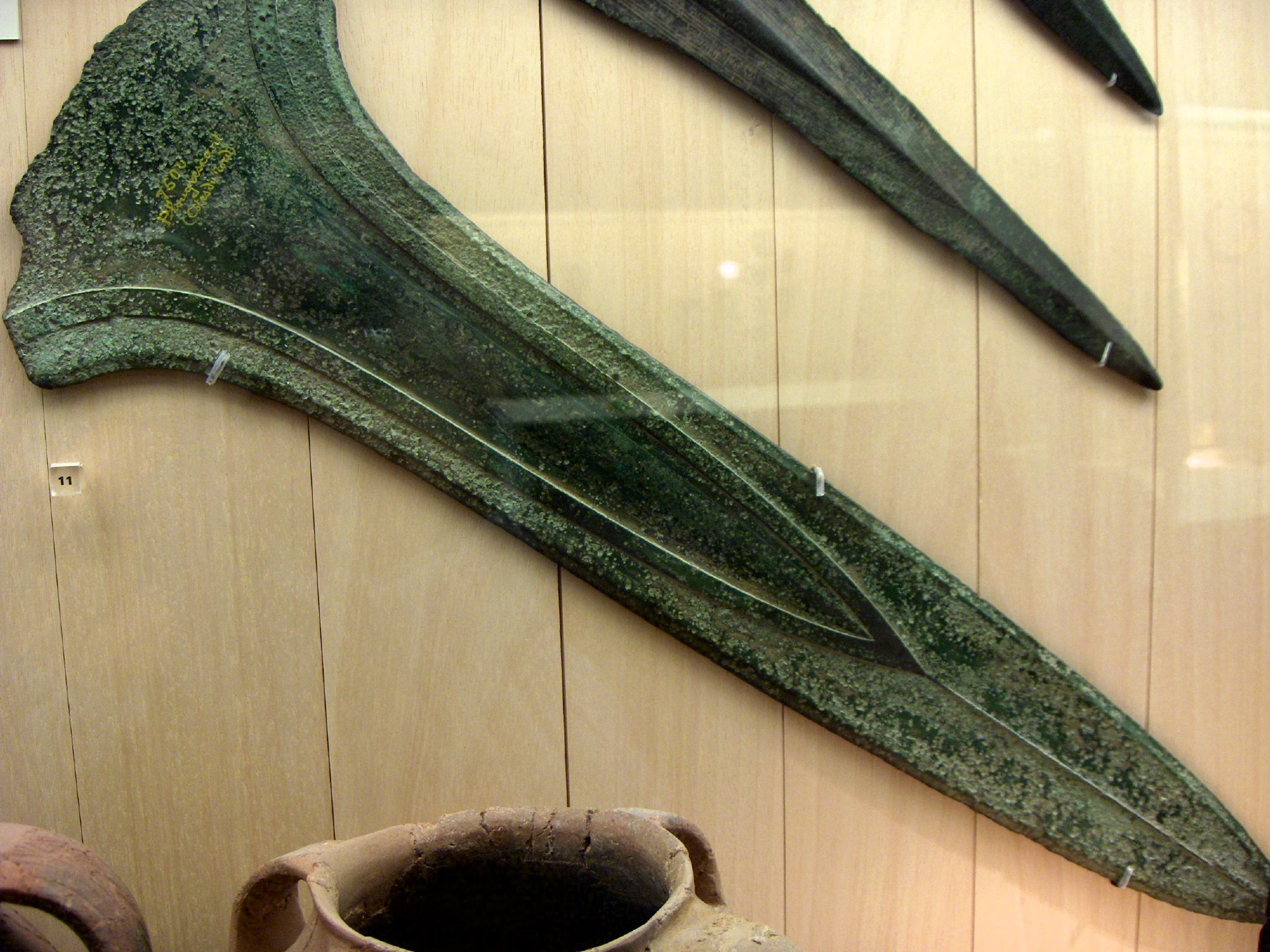 Epée, bronze, âge du bronze, vers 800 av. JC ???, musée des antiquités nationales, Saint-Germain-en-Laye